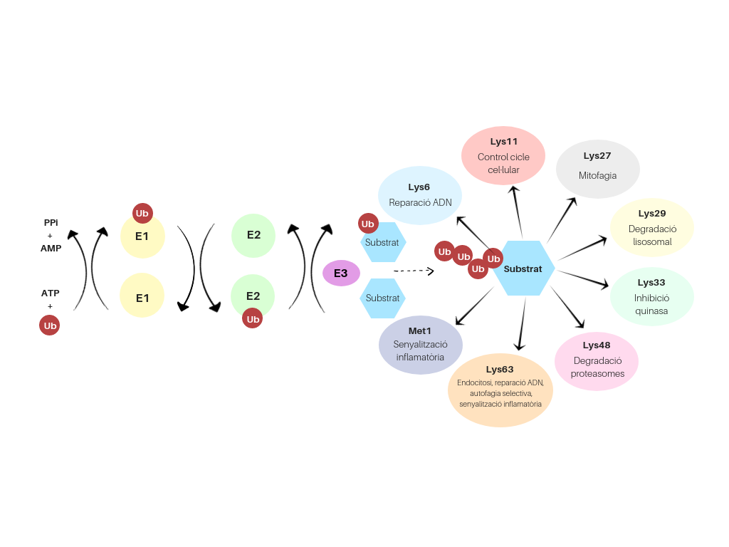 Es tracta d'una representació esquemàtica sobre les diverses fases del procés biològic d'ubiquitinació al complex LUBAC.